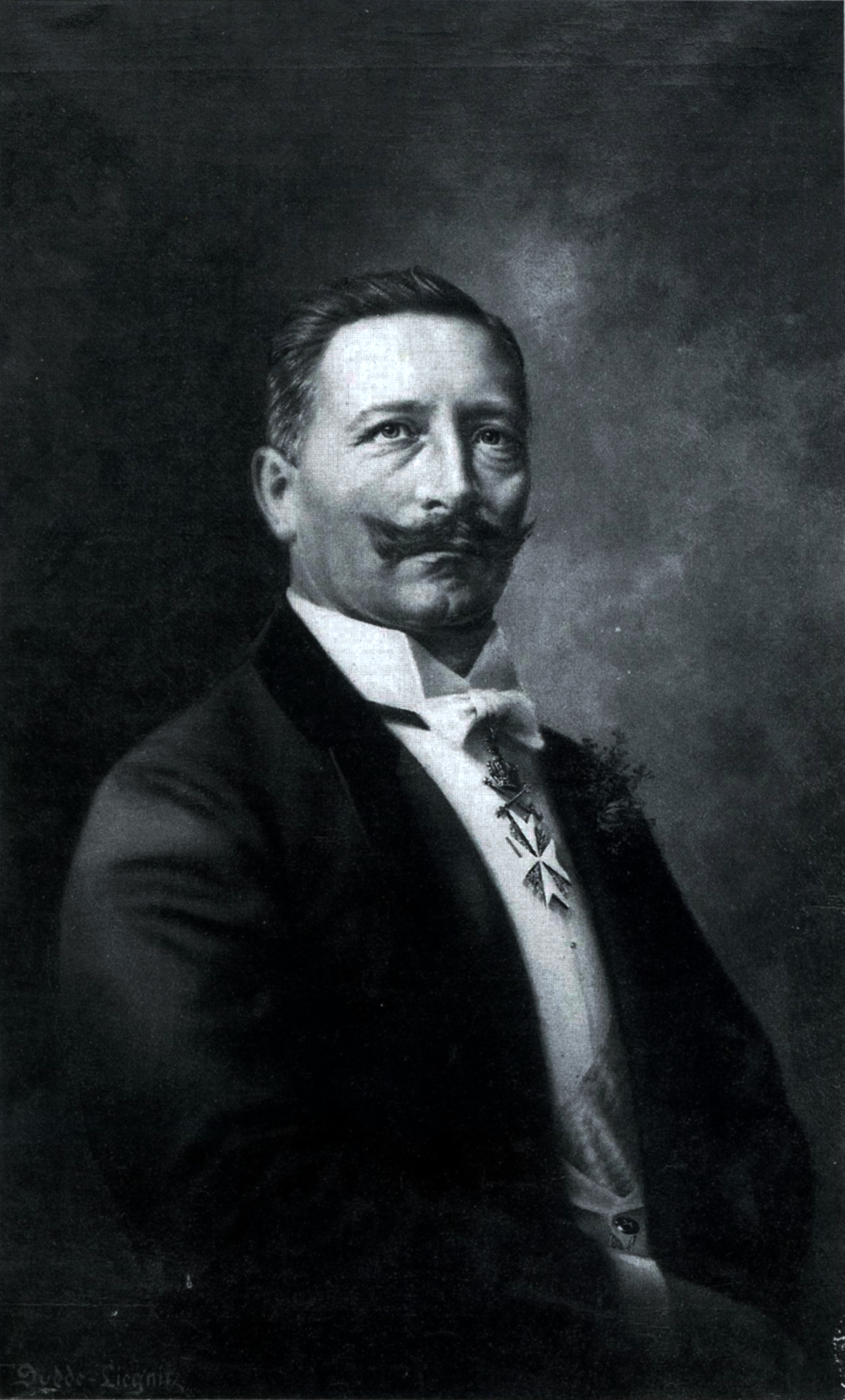 Wilhelm II.